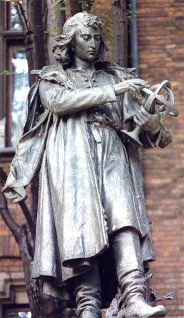 Foto gemaakt in de derde week van augustus 1993 (gedigitaliseerd 16 november 2006).